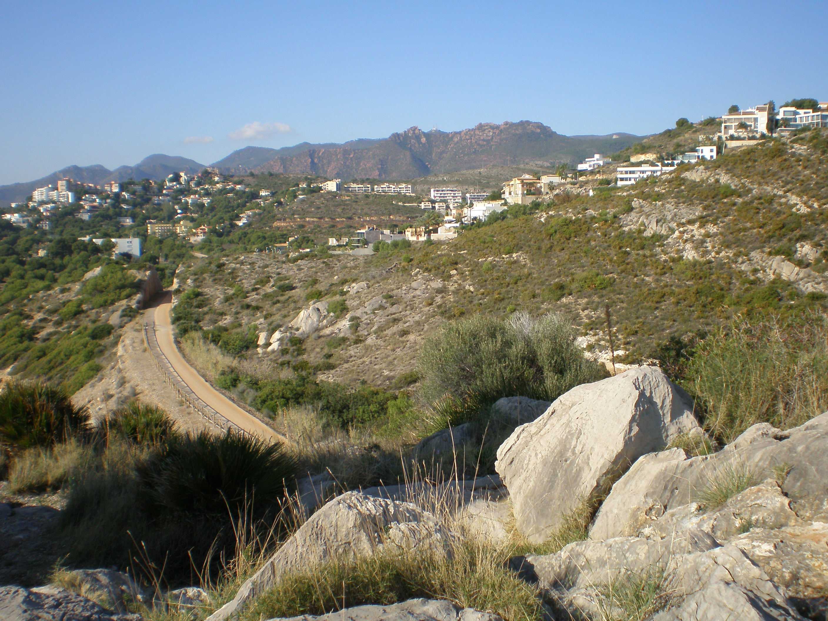 Oropesa del Mar